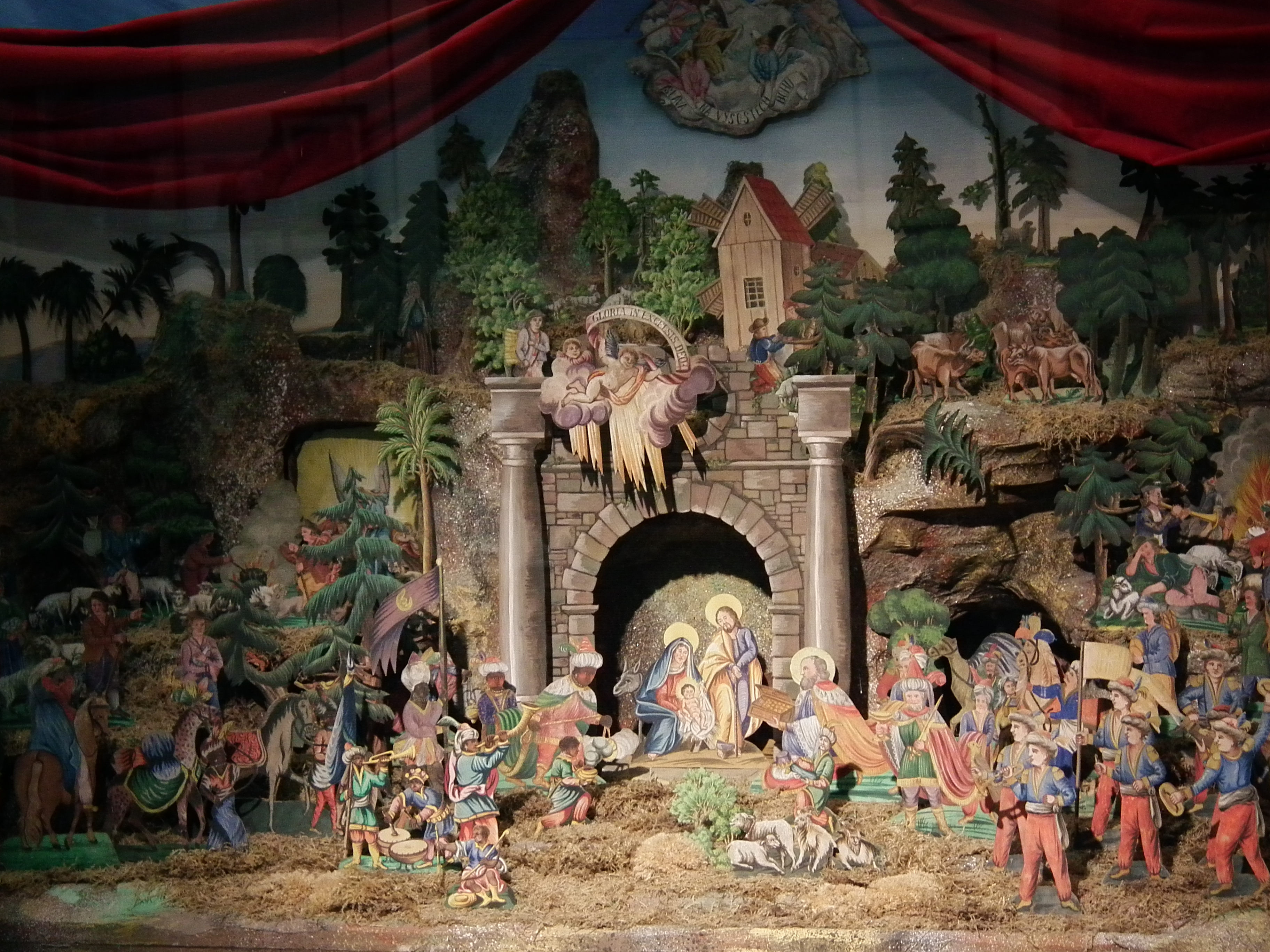 Papierkrippenberg verschiedener Trebitscher Meister, angefertigt 1885. Die Figuren haben eine Höhe von 13 cm